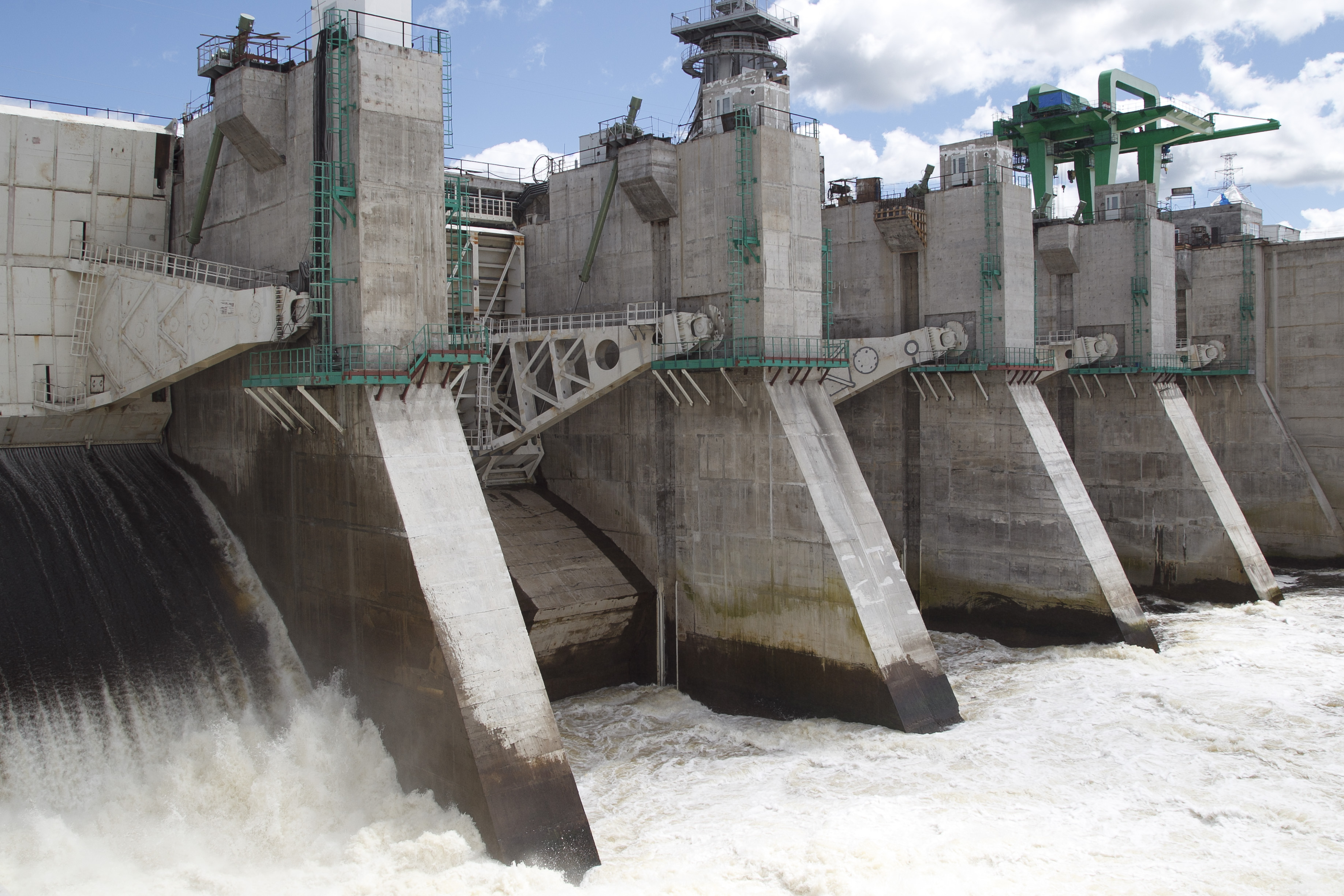 Водосбросная плотина Нижне-Бурейской ГЭС